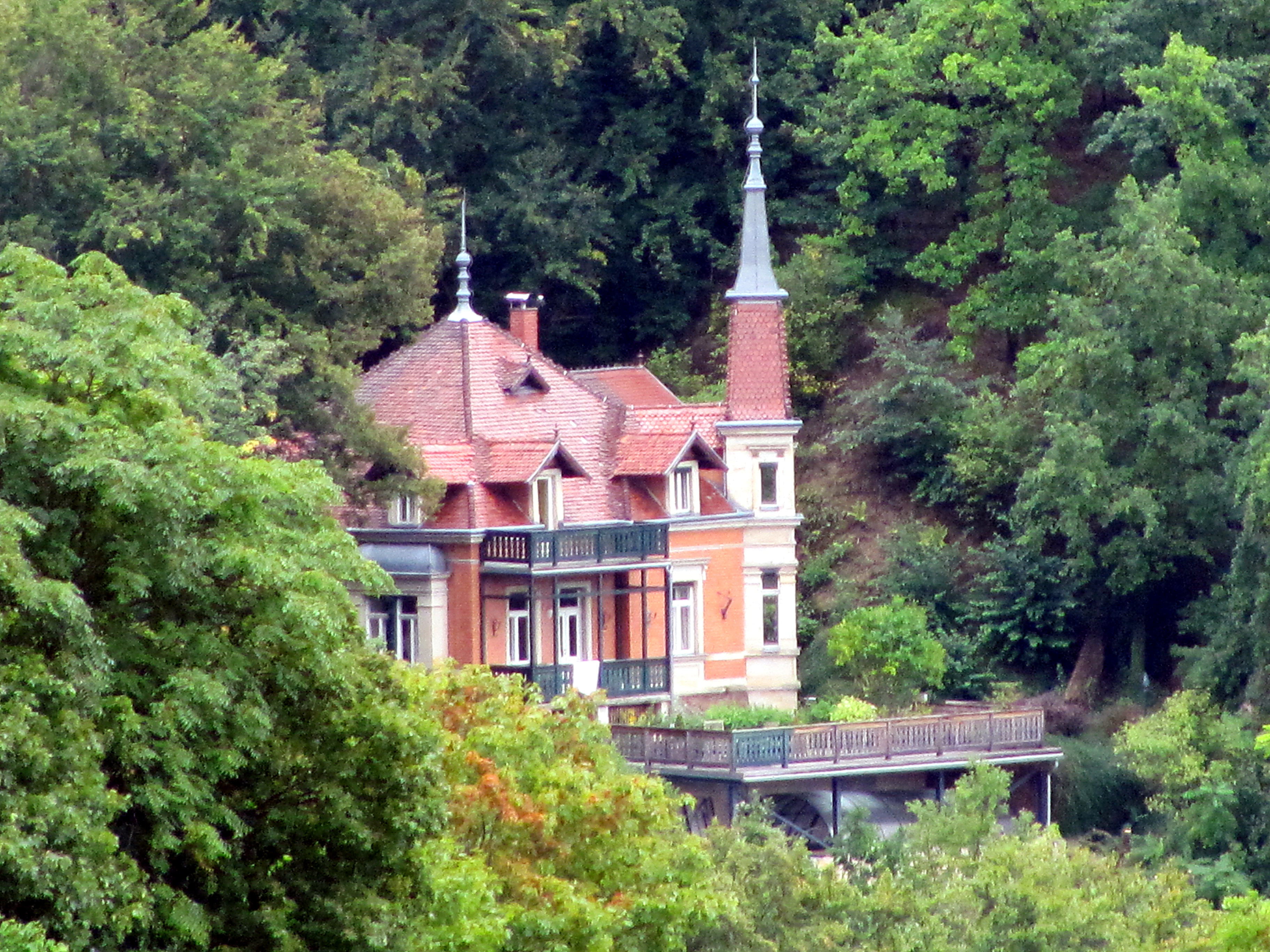 Radebeul, Villa Annabella vom Weinberg Friedensburg aus, am Tag des offenen Weinbergs